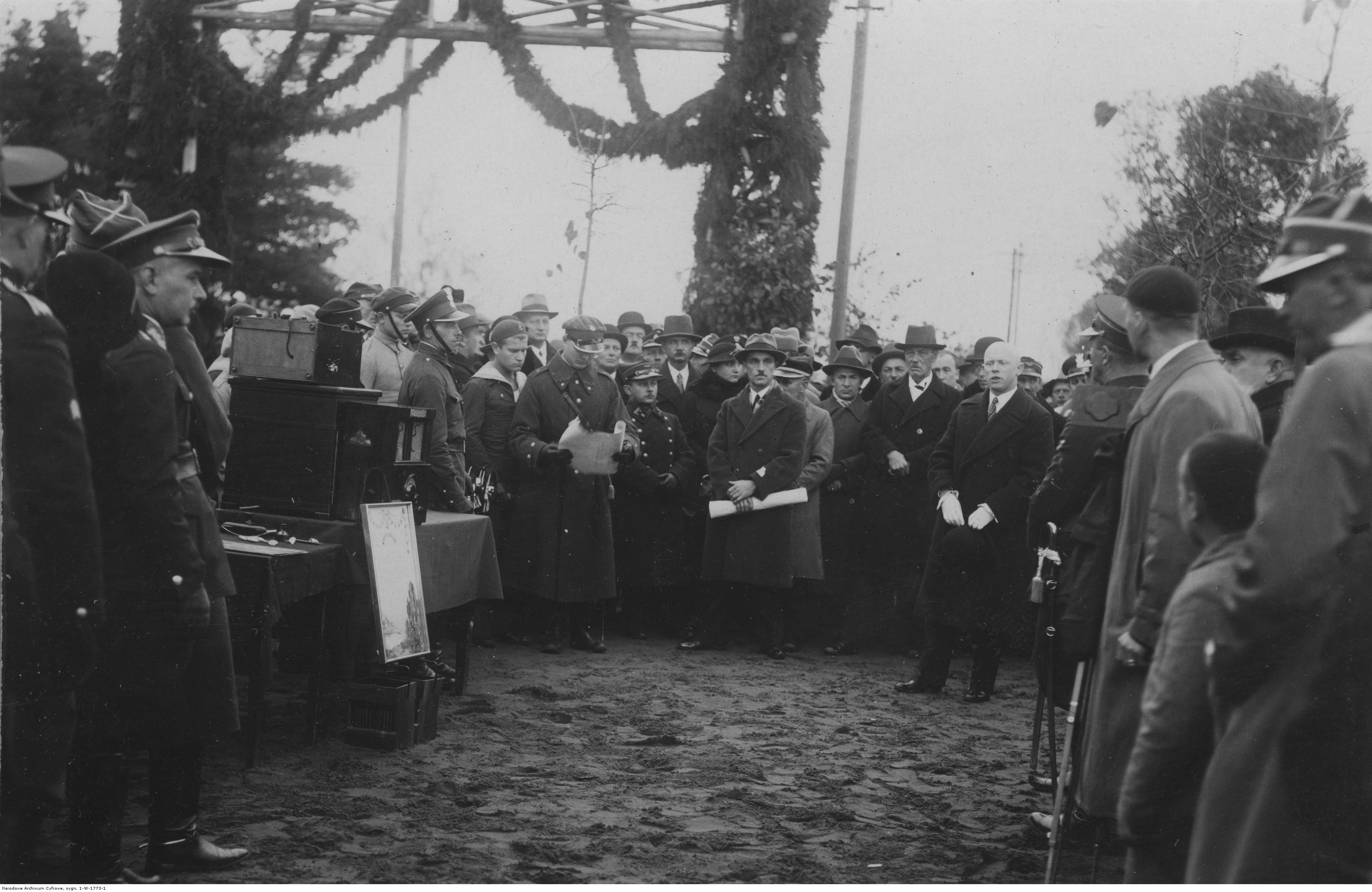 Obchody X- lecia Korpusu Ochrony Pogranicza w Batalionie KOP "Nowe Święciany"; 1934 r. Przemówienie starosty święciańskiego Stanisława Dworaka. Koncern Ilustrowany Kurier Codzienny - Archiwum Ilustracji